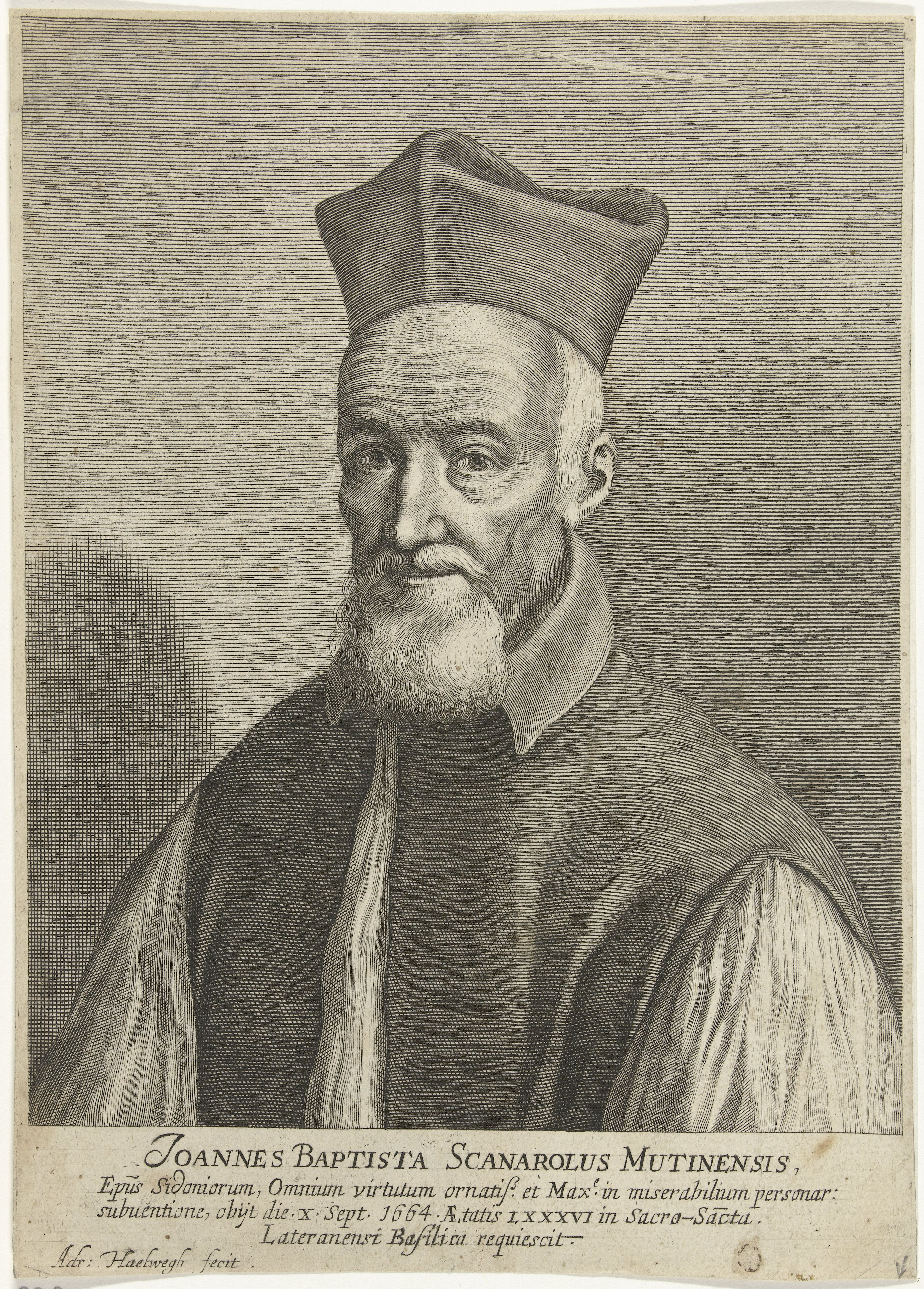 IdentificatieTitel(s): Portret van Johannes Baptist ScanaroliObjecttype: prent Objectnummer: RP-P-1909-4482Opschriften / Merken: verzamelaarsmerk, verso midden, gestempeld: Lugt 2228VervaardigingVervaardiger: prentmaker: Adriaen Haelwegh (vermeld op object)Plaats vervaardiging: Noordelijke NederlandenDatering: na 10-sep-1664 - ca. 1696Fysieke kenmerken: gravureMateriaal: papier Techniek: graveren (drukprocedé)Afmetingen: blad: h 212 mm (afgesneden op plaatrand) × b 151 mmOnderwerpWat: insignia of cardinal, e.g. hat, mantleWie: Johannes Baptist ScanaroliVerwerving en rechtenVerwerving: aankoop 1905Copyright: Publiek domein